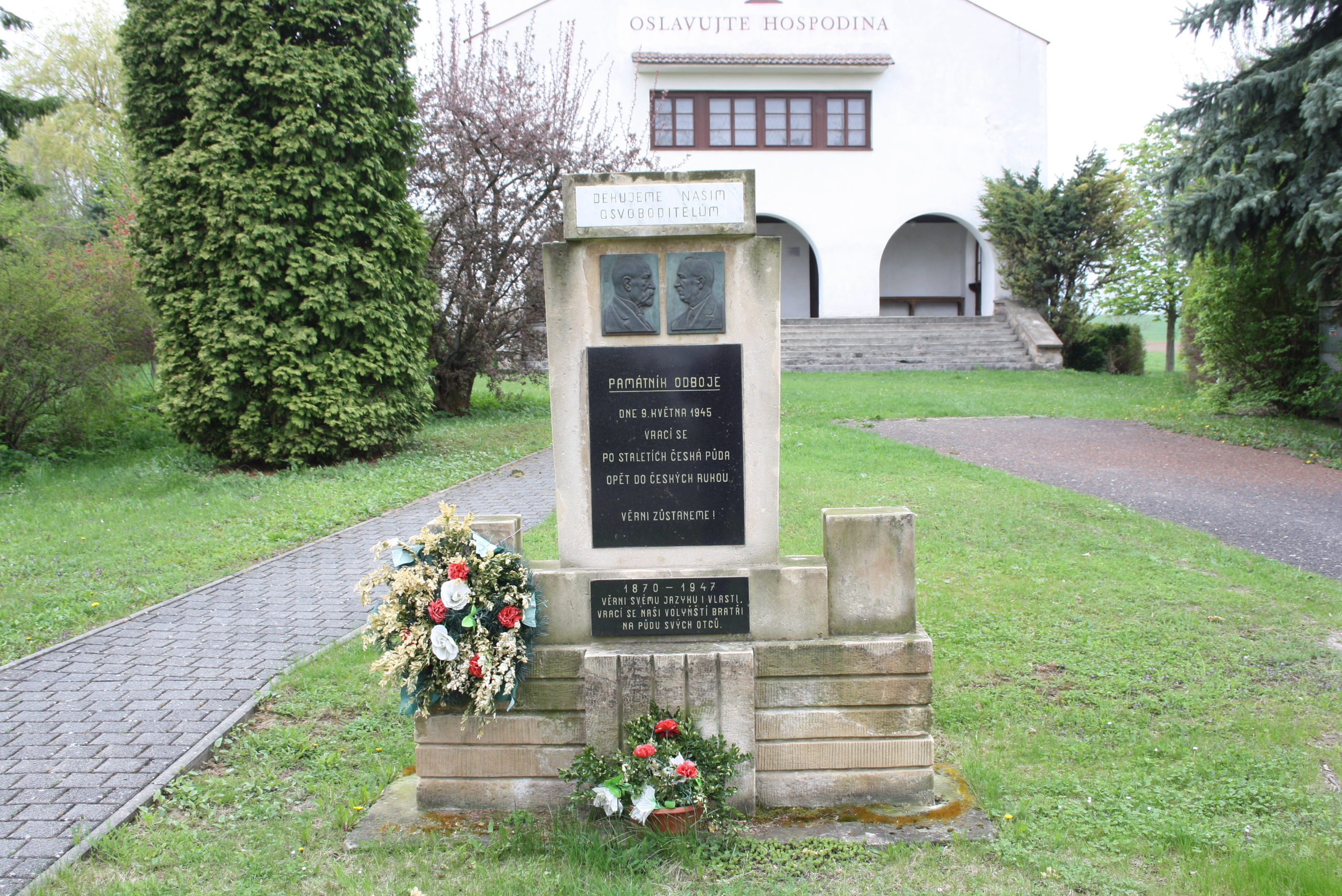 Pomník k oslavě konce druhé světové války a k návratu volyňských Čechů.